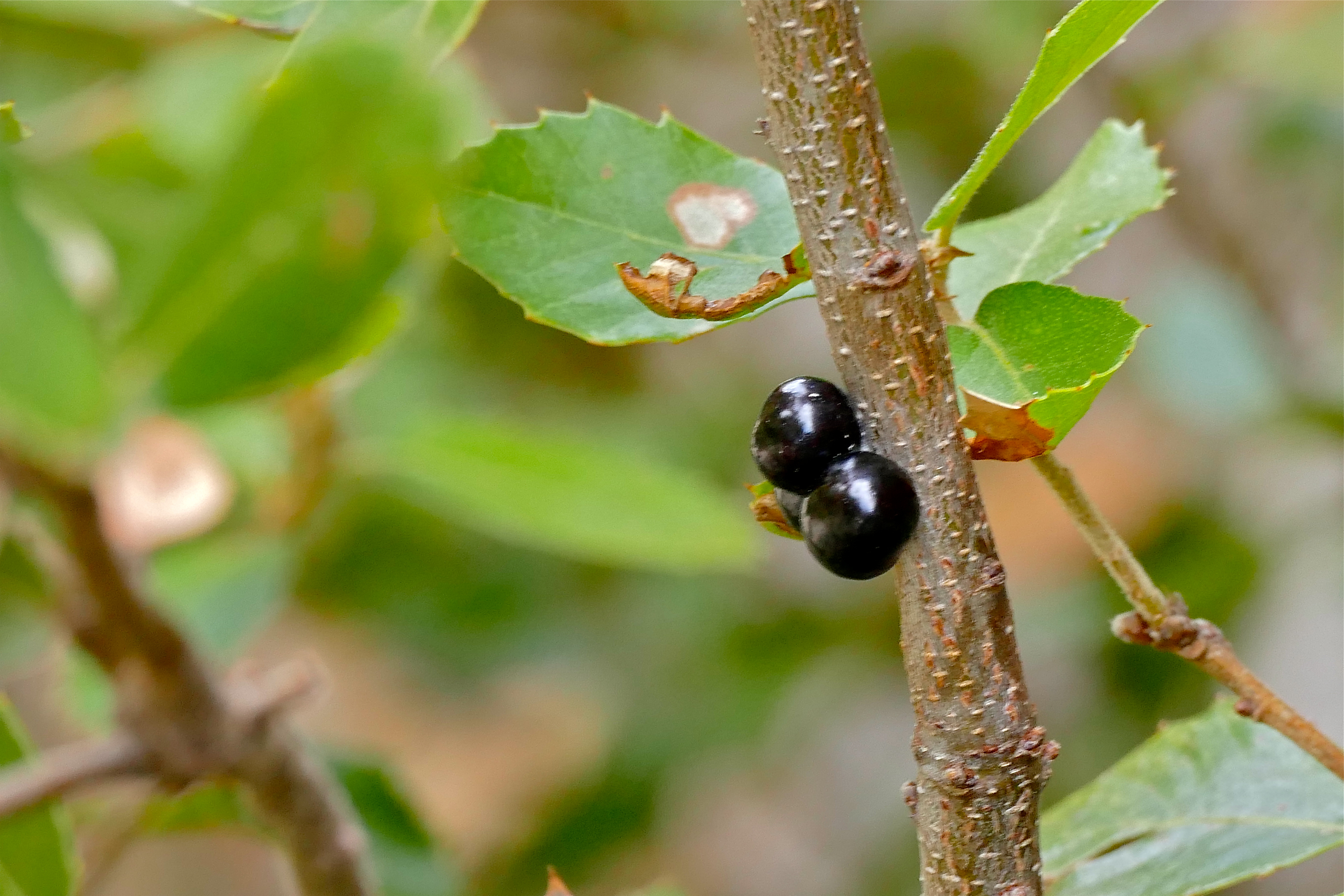 Gorges d'Héric, Mons-la-Trivalle, Hérault, FRANCE